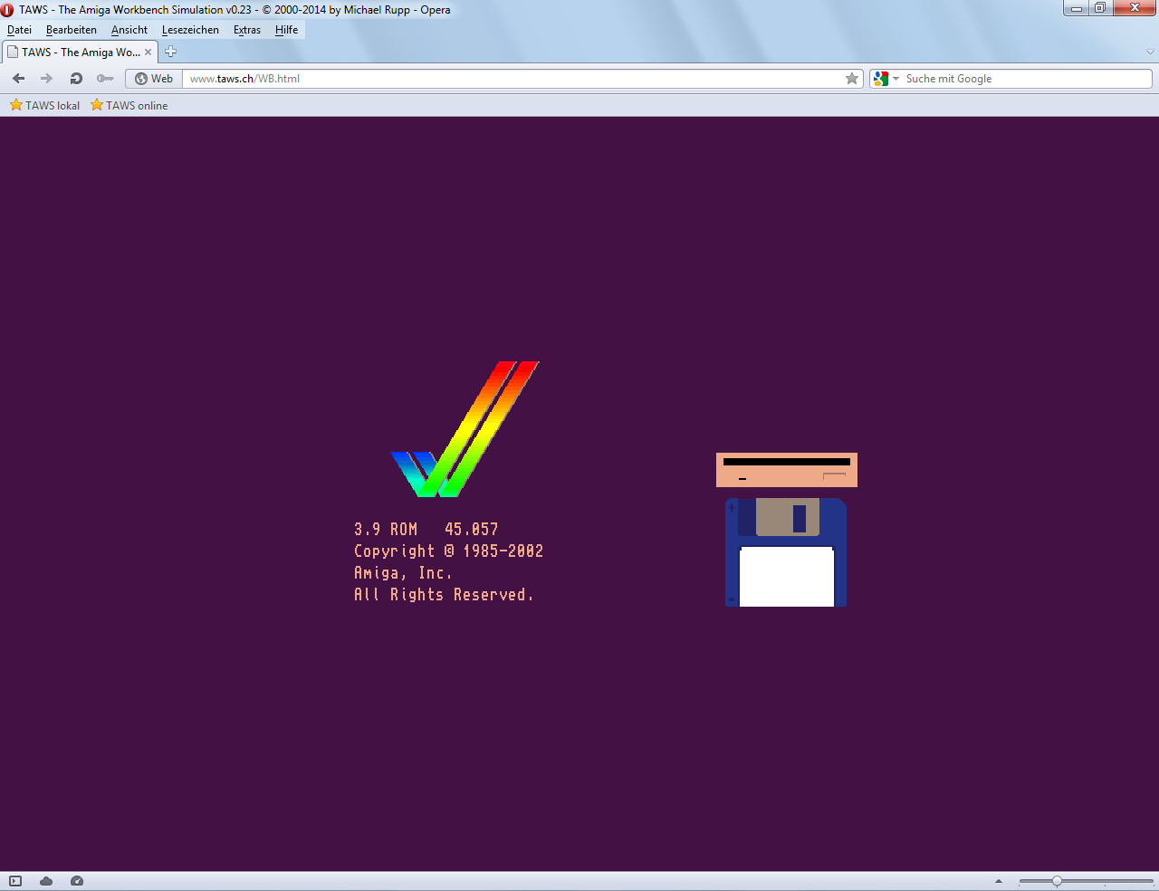 TAWS 0.23 bei der Anzeige der AmigaOS 3.9-Kickstart-Animation (im Opera-Browser)